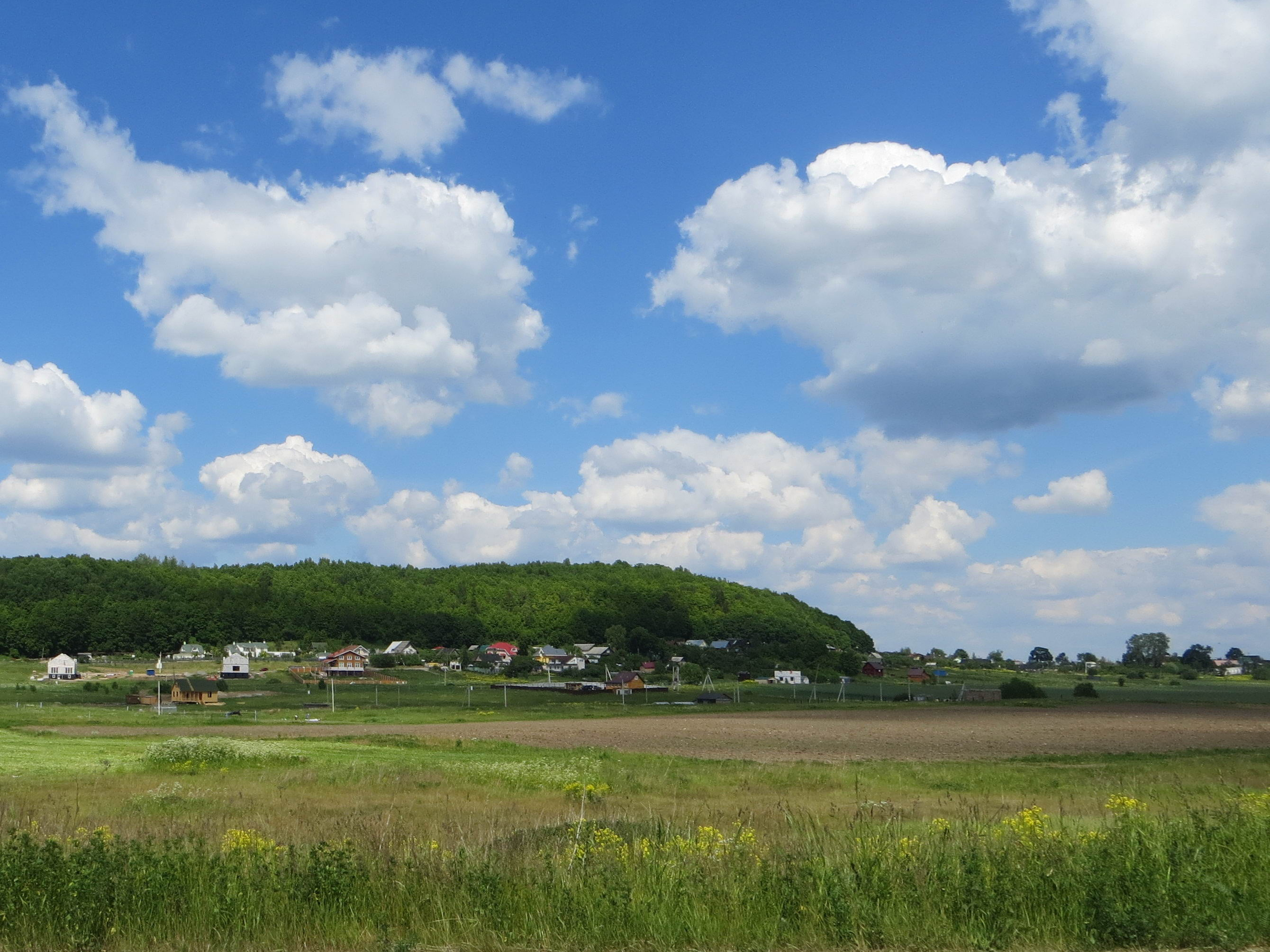 Деревня Вариксолово. 2015 г.